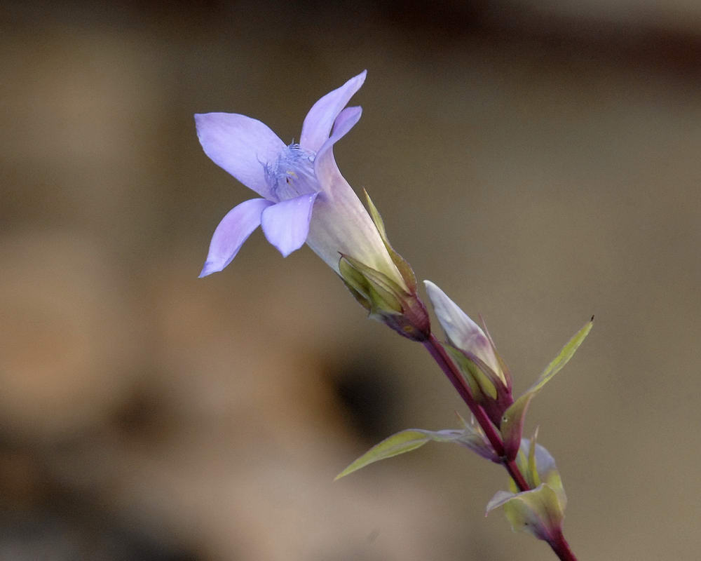 Alfonso Colombo - Gentiana pumila trovata in Val di San Martino-Dolomiti bellunesi la foto è di pubblico dominio